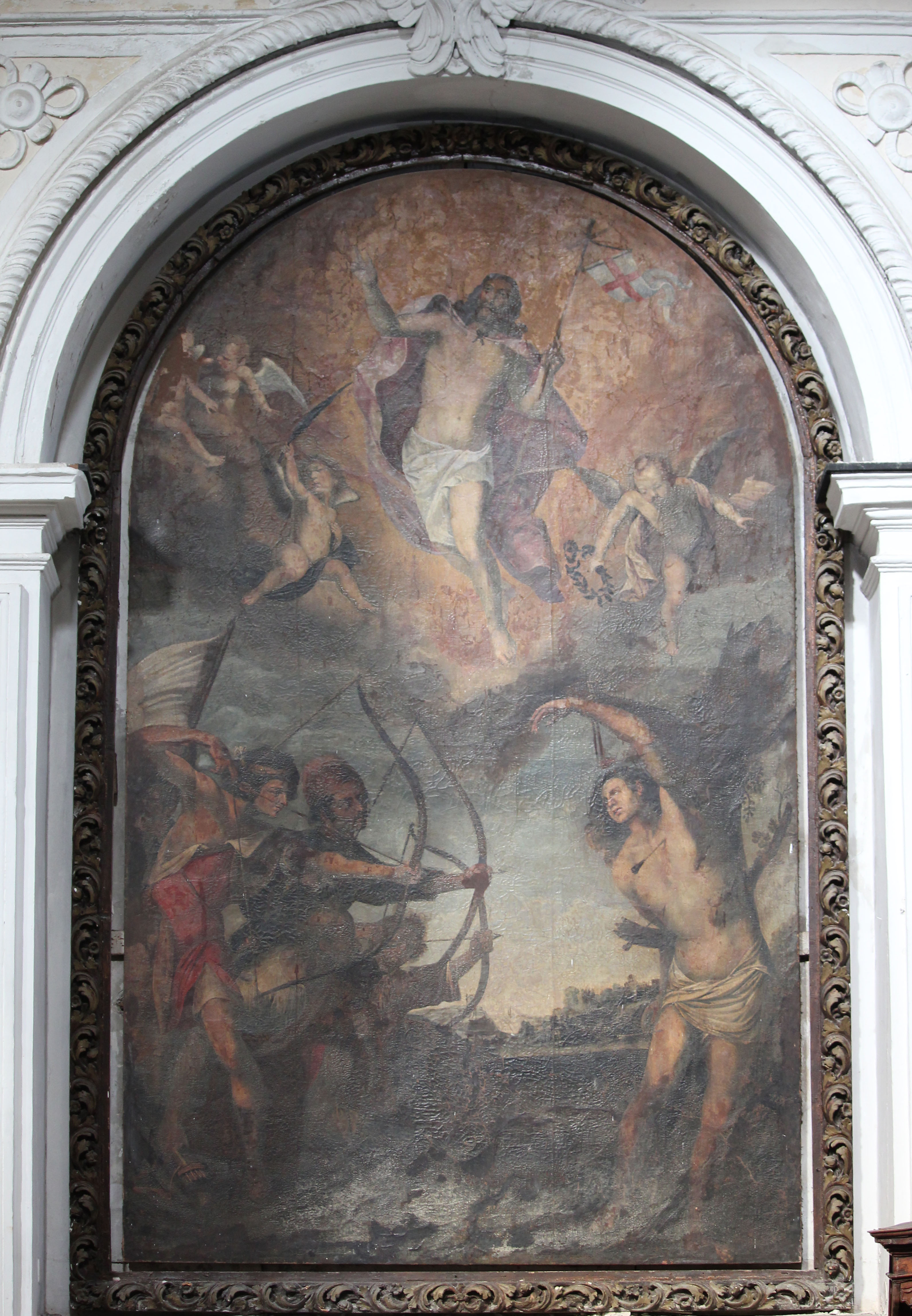 tela S.Sebastiano, santa lucia del mela